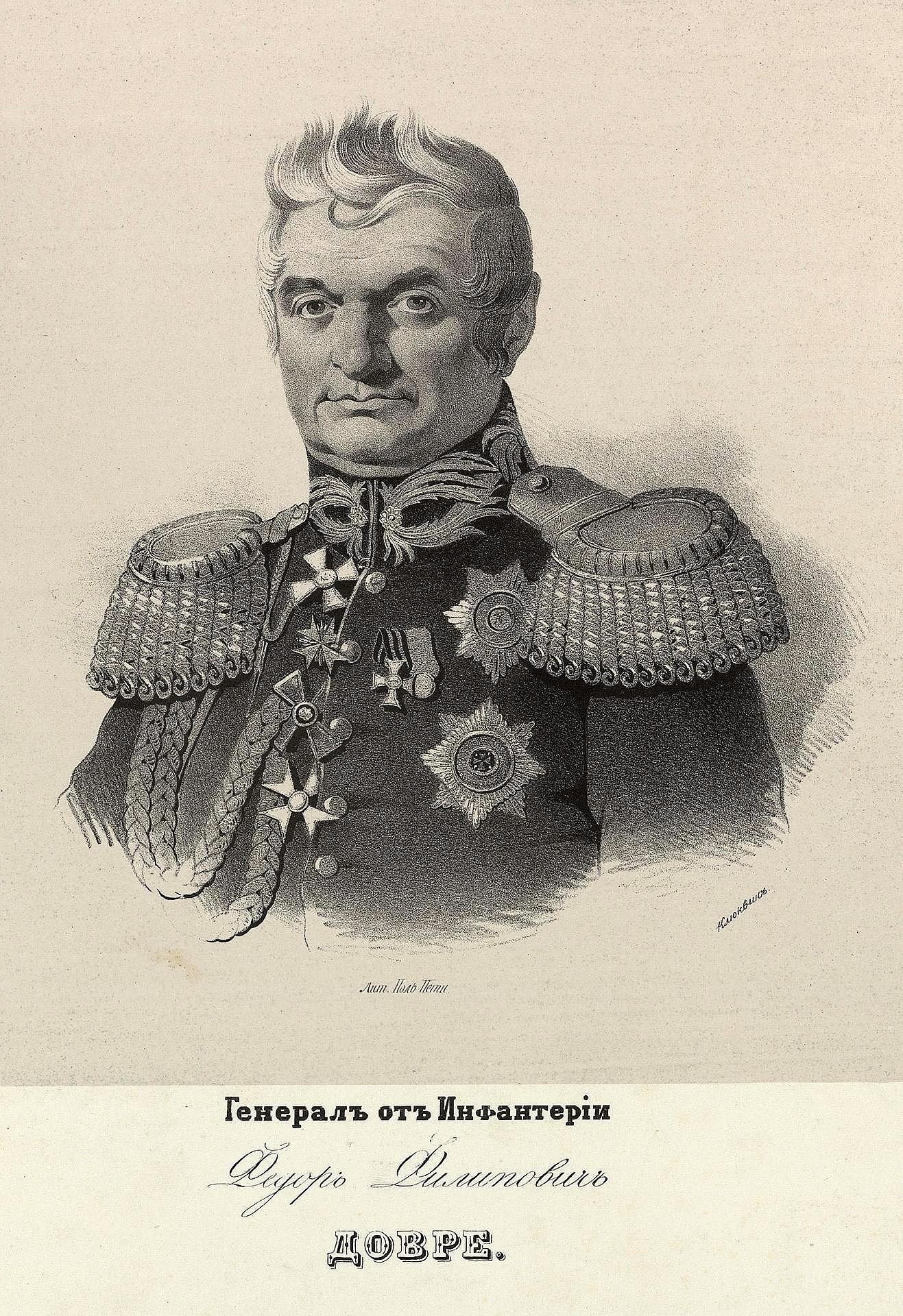 Портрет генерала Ф. Ф. Довре